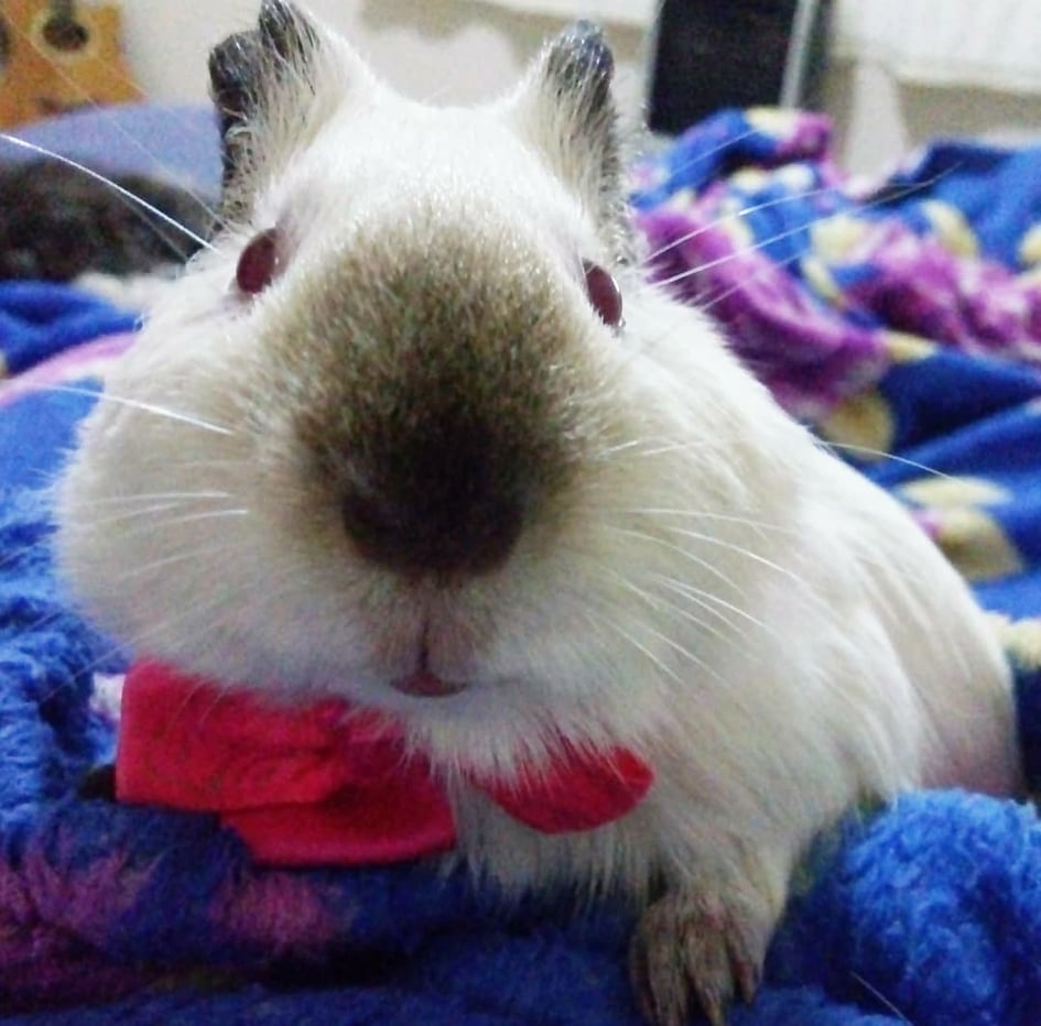 Porquinho-da-Índia Himalaio